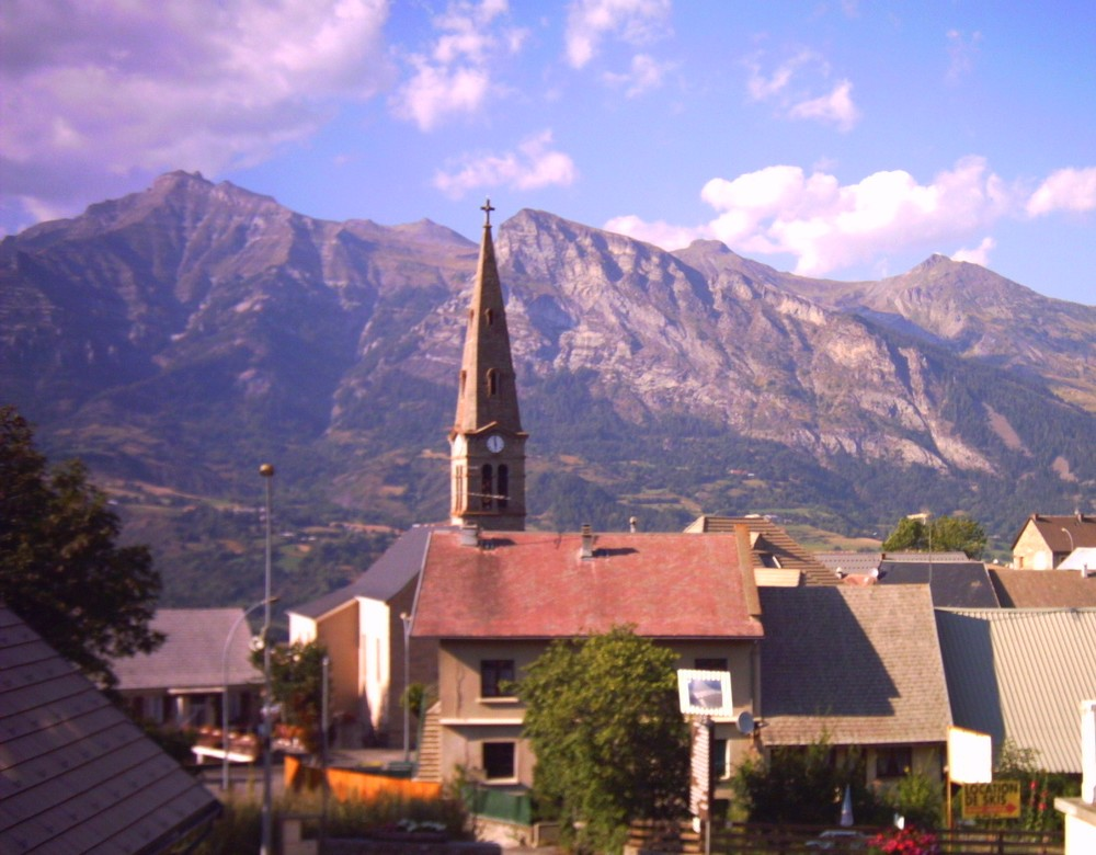 Saint-Léger-les-Mélèzes et le massif du Vieux-Chaillol